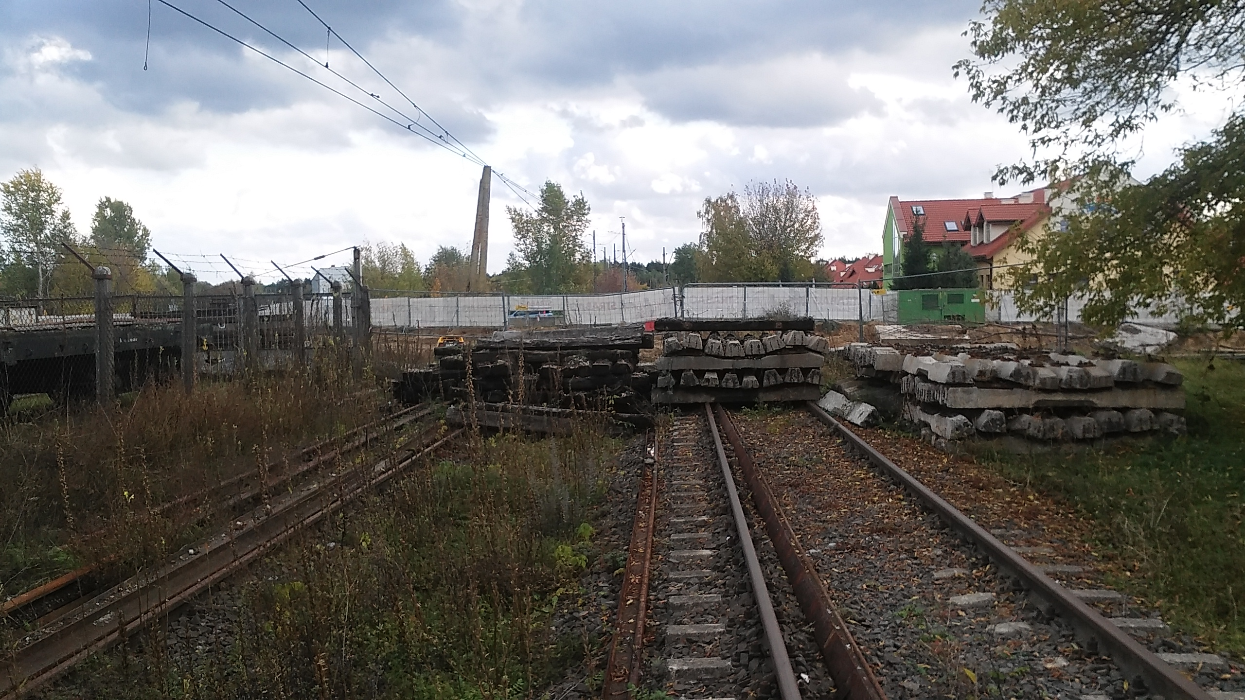 Białystok Starosielce - rozebrane linie kolejowe nr 515 (L) i 516 (P) z uwagi na budowę tunelu drogowego pod torami w ciągu ulicy Klepackiej. Widok od północy.